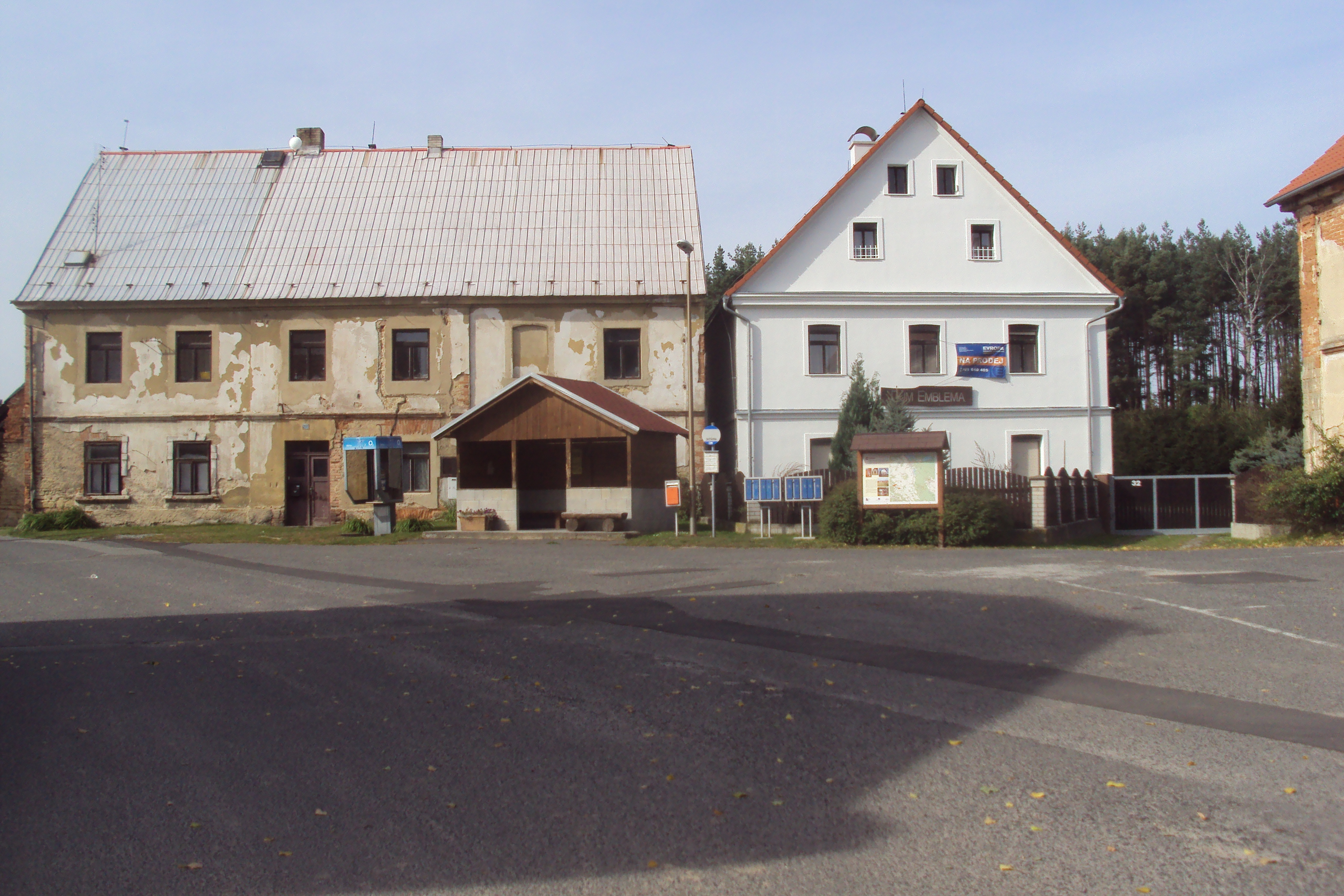 Obec Ždárec, náves